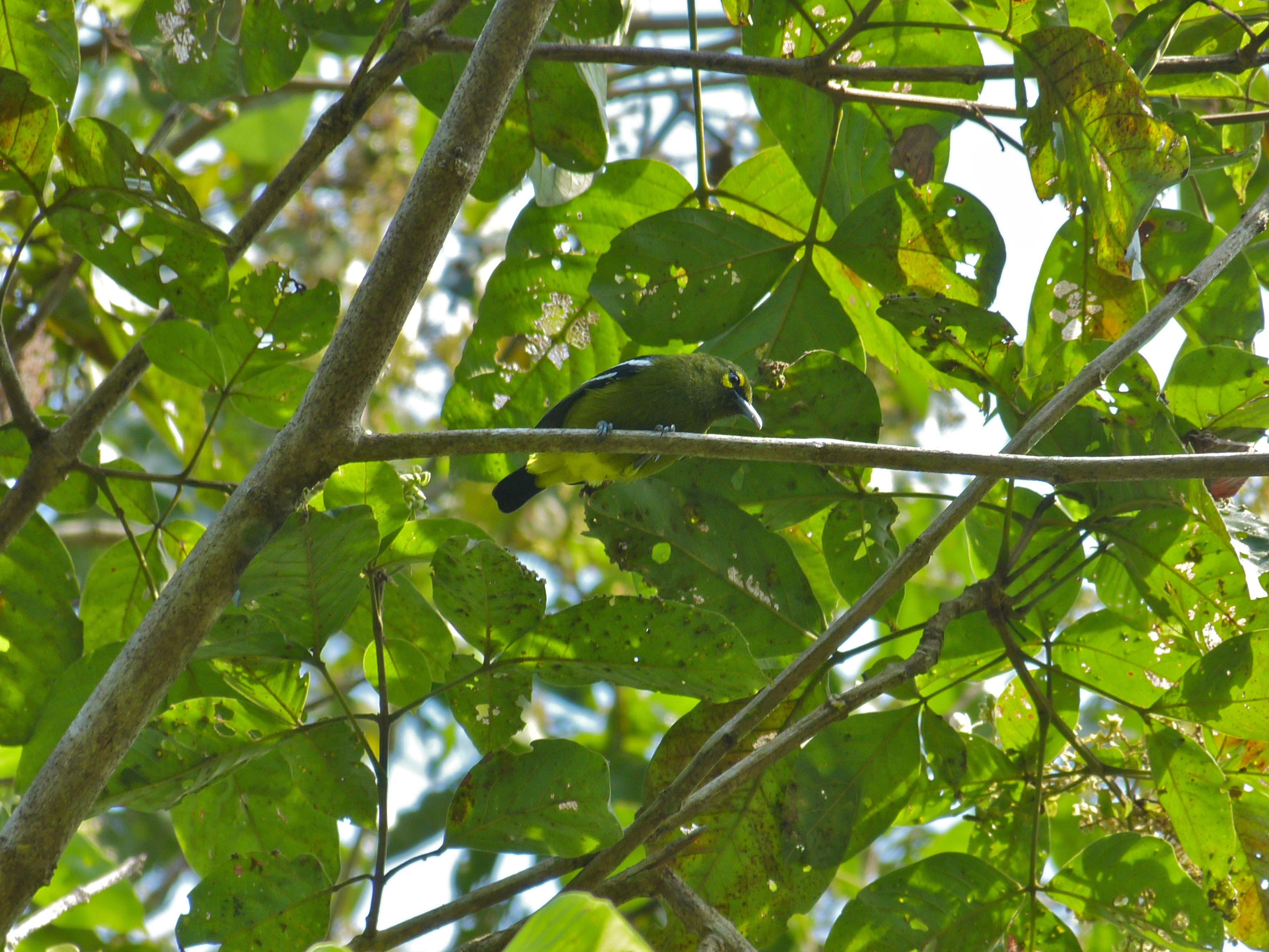 Bilit, Sabah, MALAYSIA